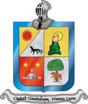 Escudo de Armas, Municipio de Guadalupe, Nuevo León. MÉXICO